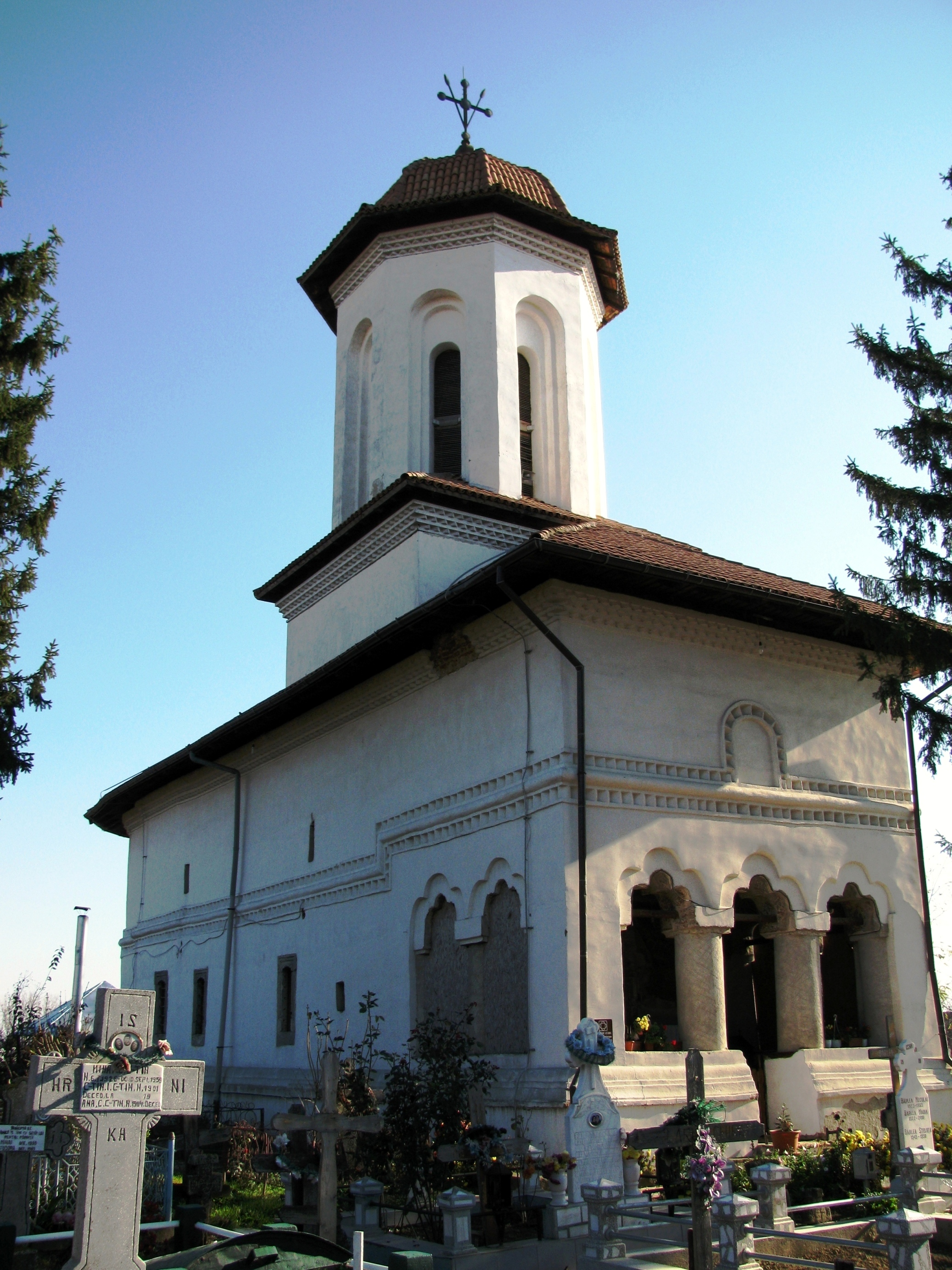 Biserica Buna Vestire din com. Vernești, Buzău, România a fost construită de jupan Jipa și Stanciu Vernescu între anii 1714-1721, pe vremea domnitorilor Ștefan Cantacuzino și Nicolae Mavrocordat în Țara Românească. 01